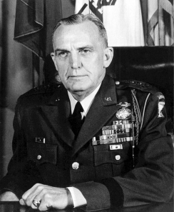 Robert Sink